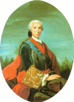 Retrato de Felipe de Borbón y Farnesio (1720-1765), hijo del rey Felipe V de España y de la reina Isabel de Farnesio. Fue infante de España y duque de Parma, de Plasencia y de Guastalla y el fundador de la rama de la Casa de Borbón-Parma.